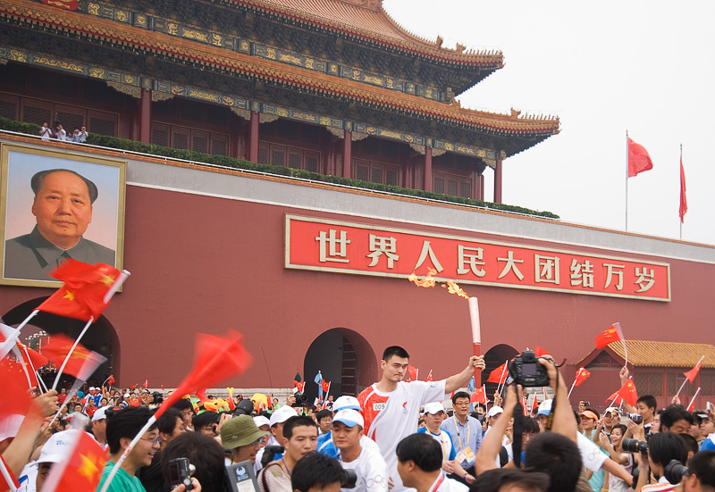 姚明正在奥运圣火传递